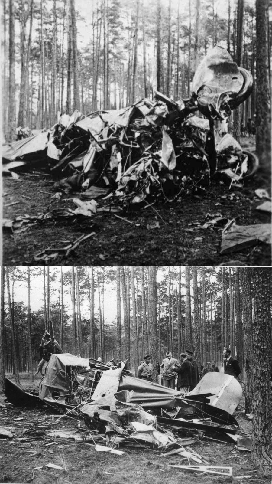 Место крушения Литуаники